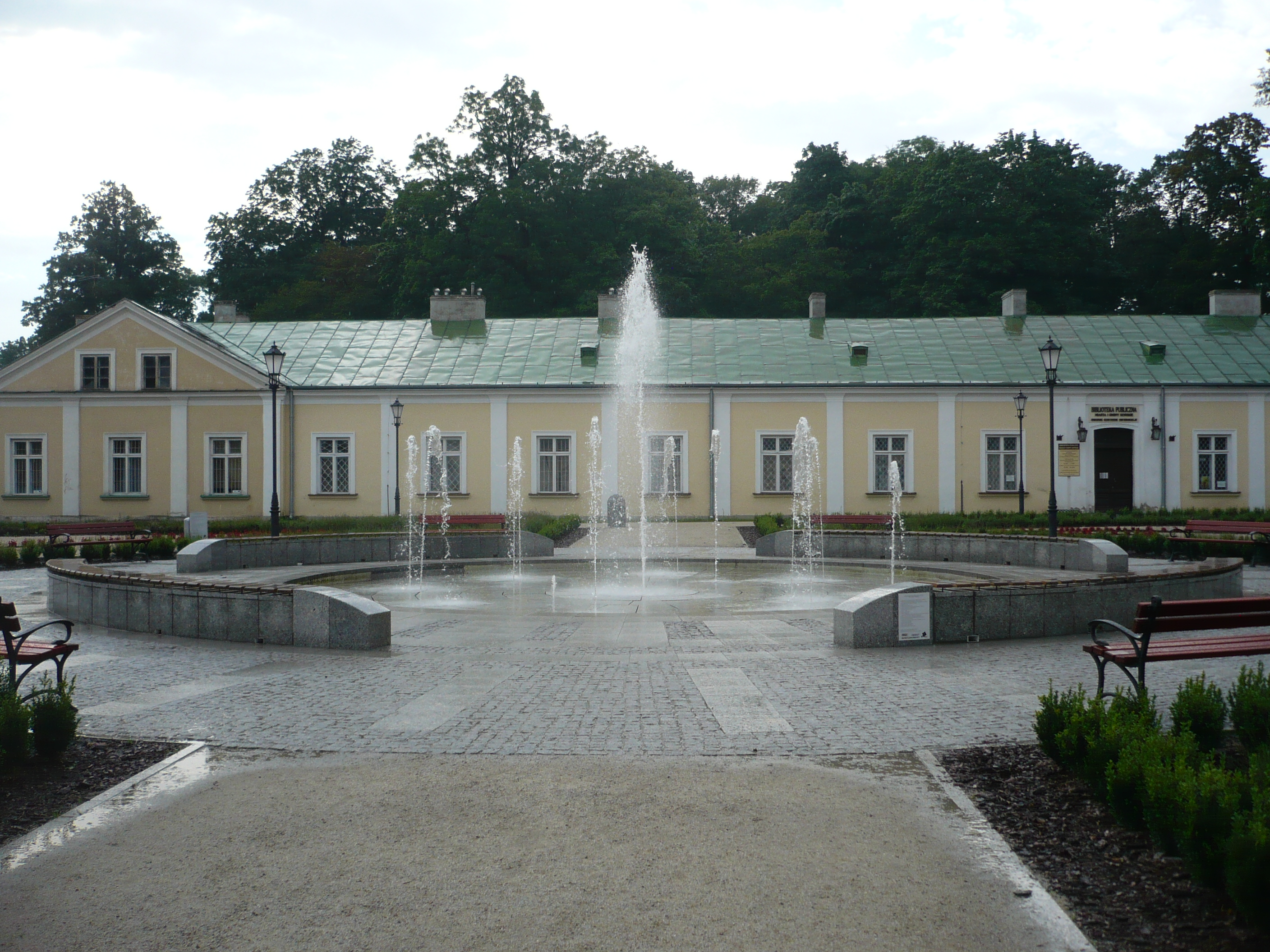 Z tyłu: Biblioteka Publiczna